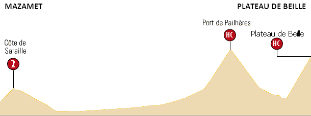 Profile of stage 14 of the 2007 Tour de France - 14e etappe v/d Ronde van Frankrijk 2007